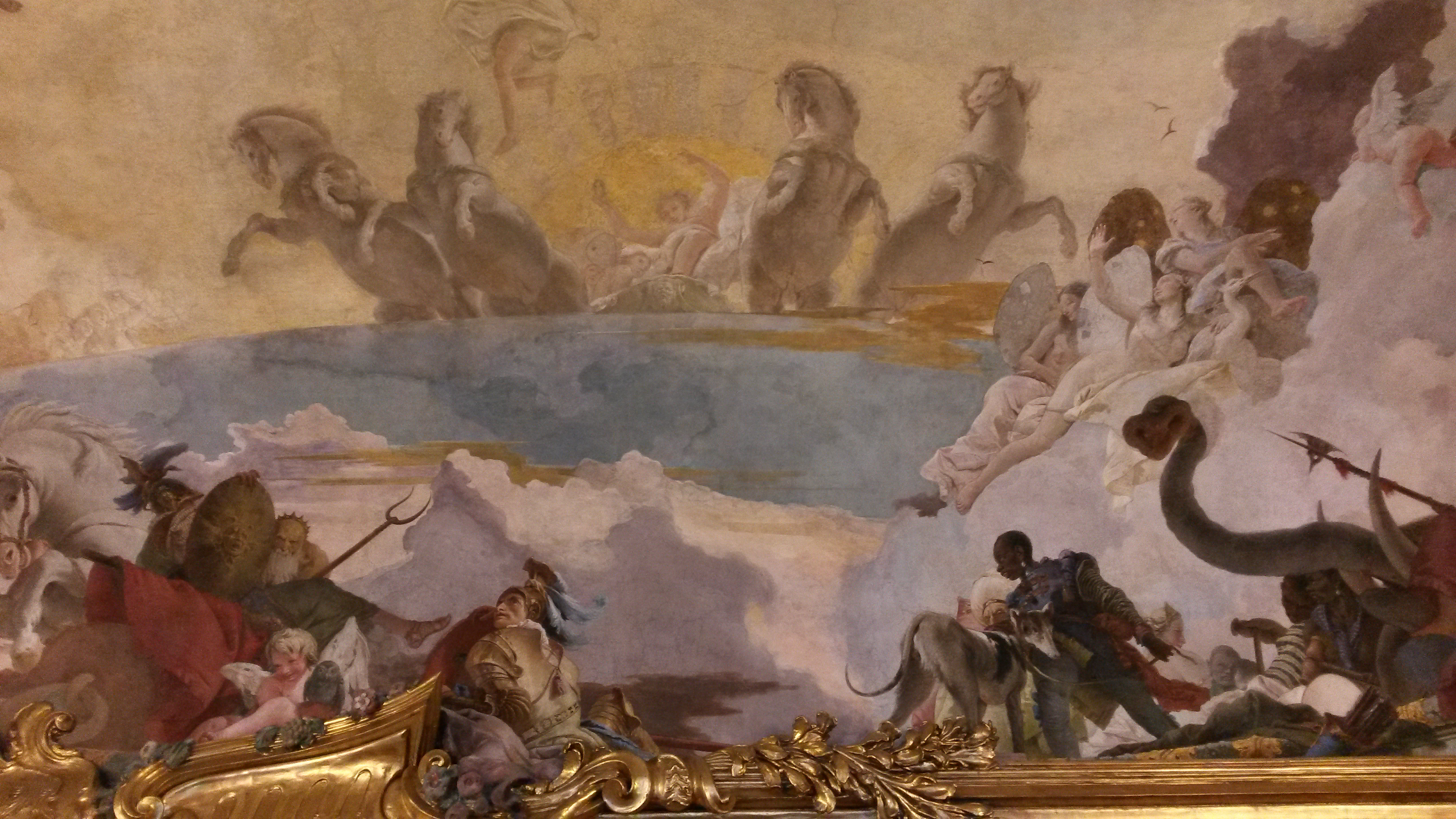 La corsa del carro del Sole tra le divinità dell'Olimpo, contorniata dalle Allegorie dei quattro Continenti e dalle Allegorie delle Arti, Giambattista Tiepolo, affresco della Galleria degli Arazzi, Milano, Palazzo Clerici (dettaglio)